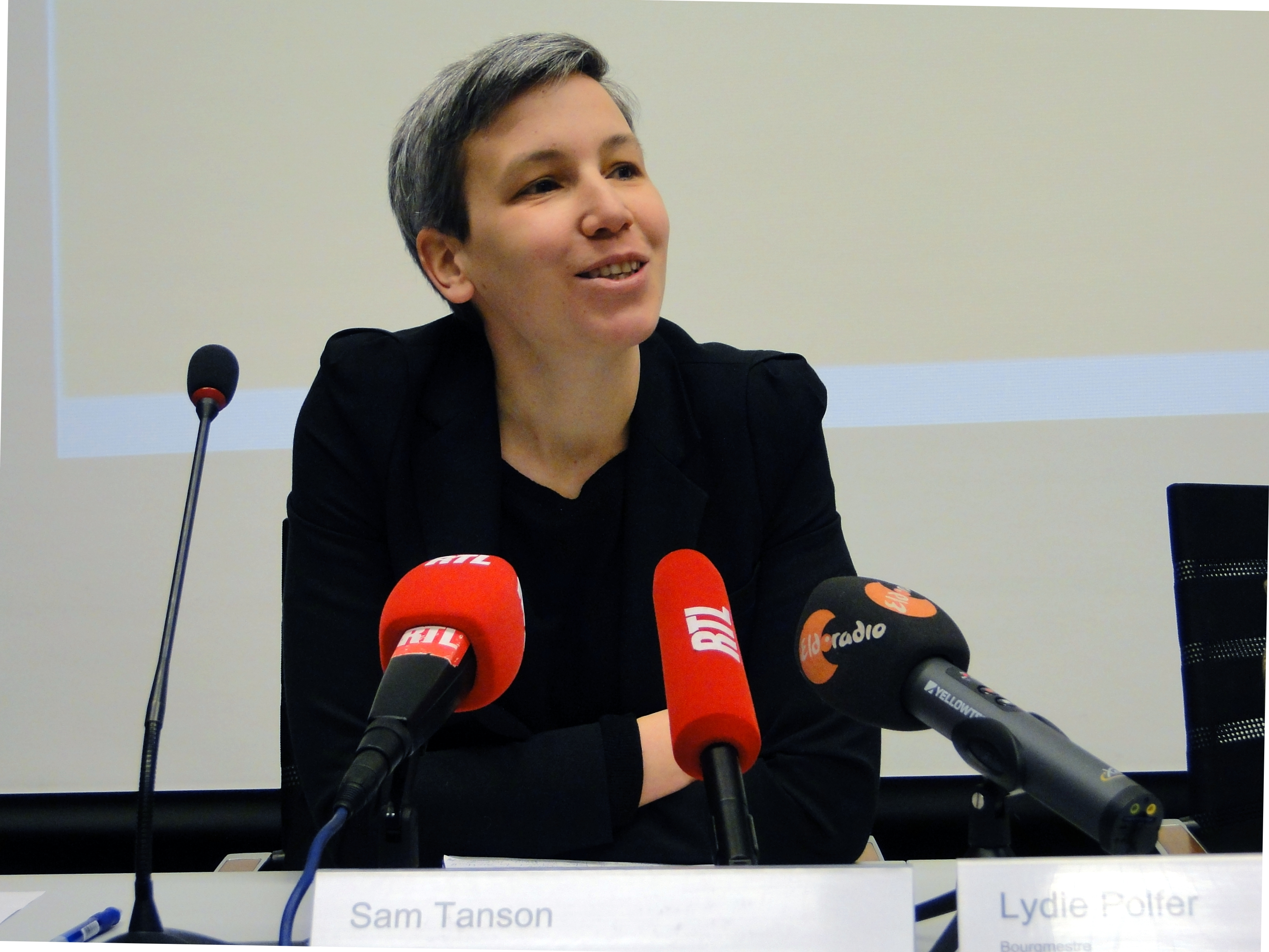 D'Sam Tanson op enger Pressekonferenz de 16. Mäerz 2015 am Cercle-Cité